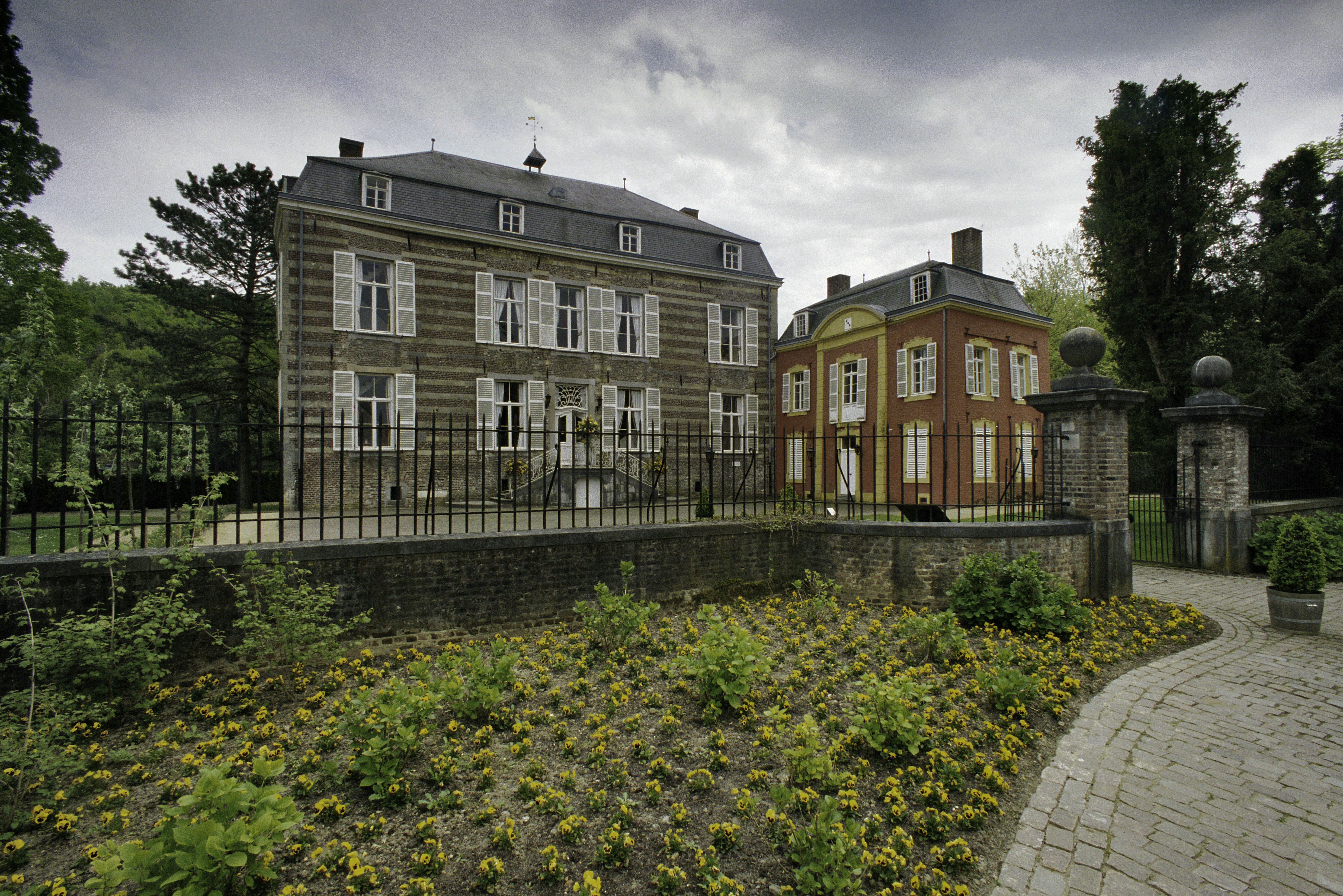 Kasteel Strijthagen: Overzicht van de voorgevel van het herenhuizen, bestaande uit twee losstaande gebouwen (opmerking: Gefotografeerd voor Kastelen in Limburg (1000-1800), Burchten en landhuizen, bladzijde 444)